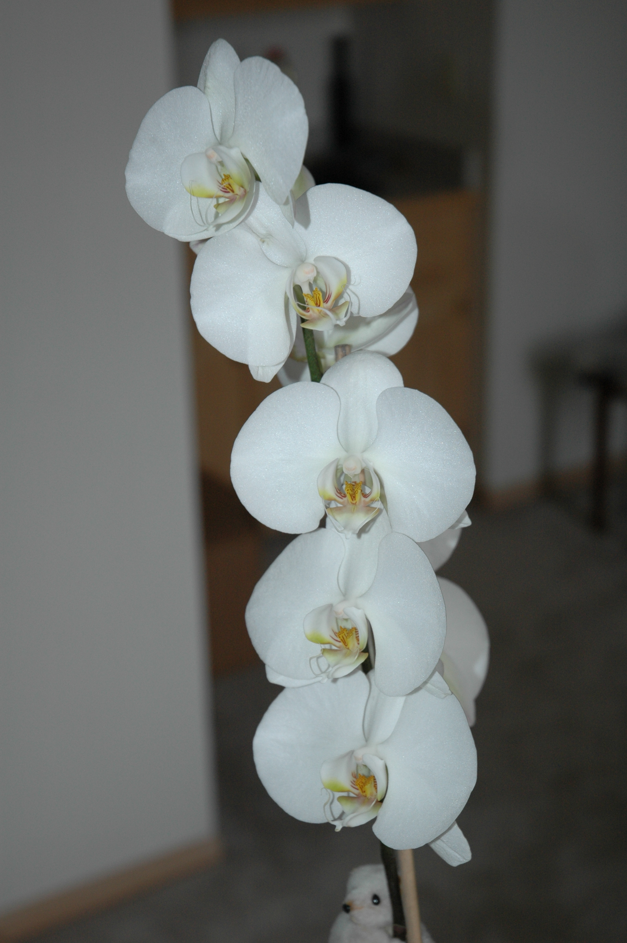 OrchidsOrchids